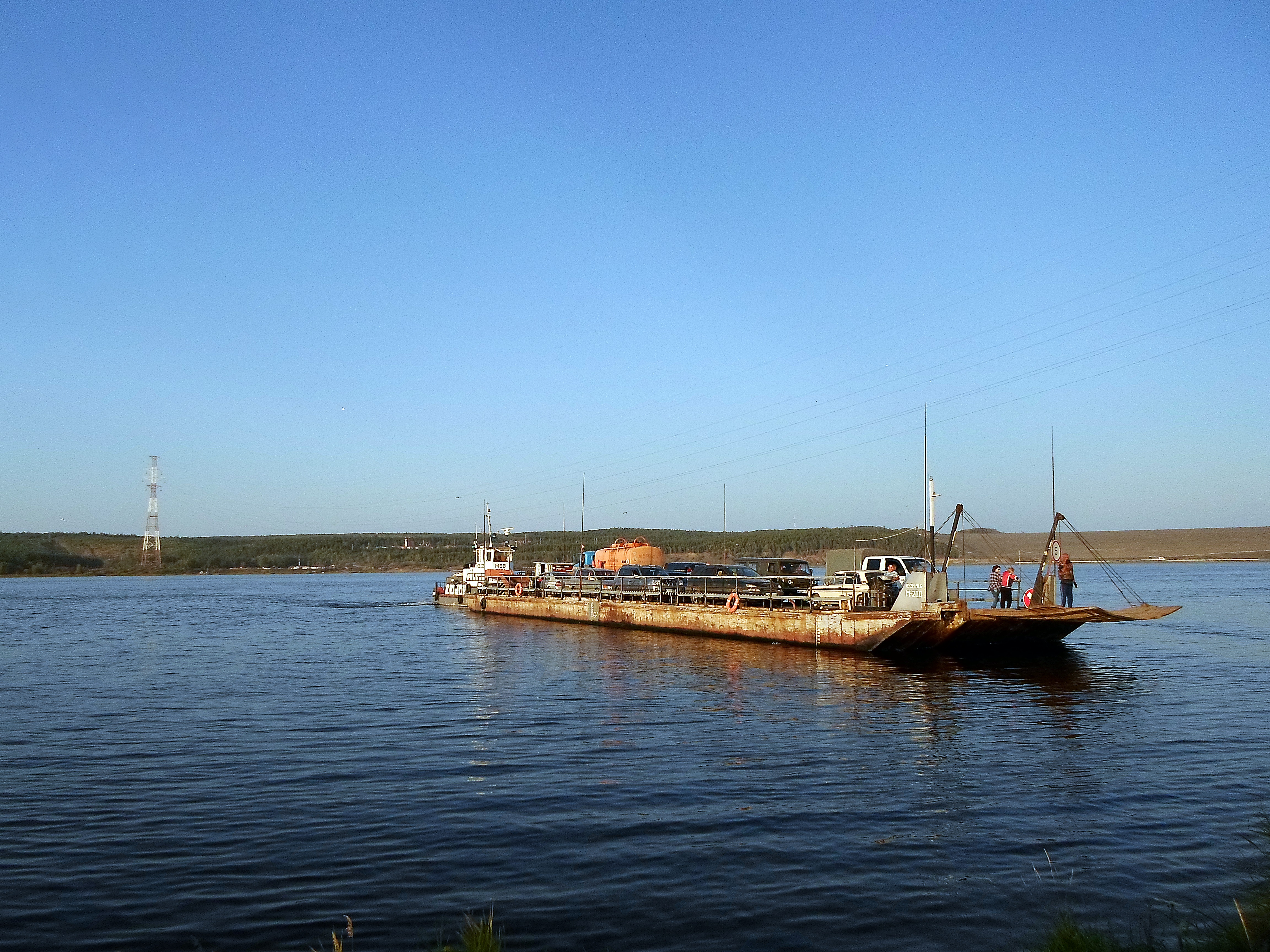 Паром на Ангаре в нижнем бьефе Богучанской ГЭС. Кежемский район Красноярского края.